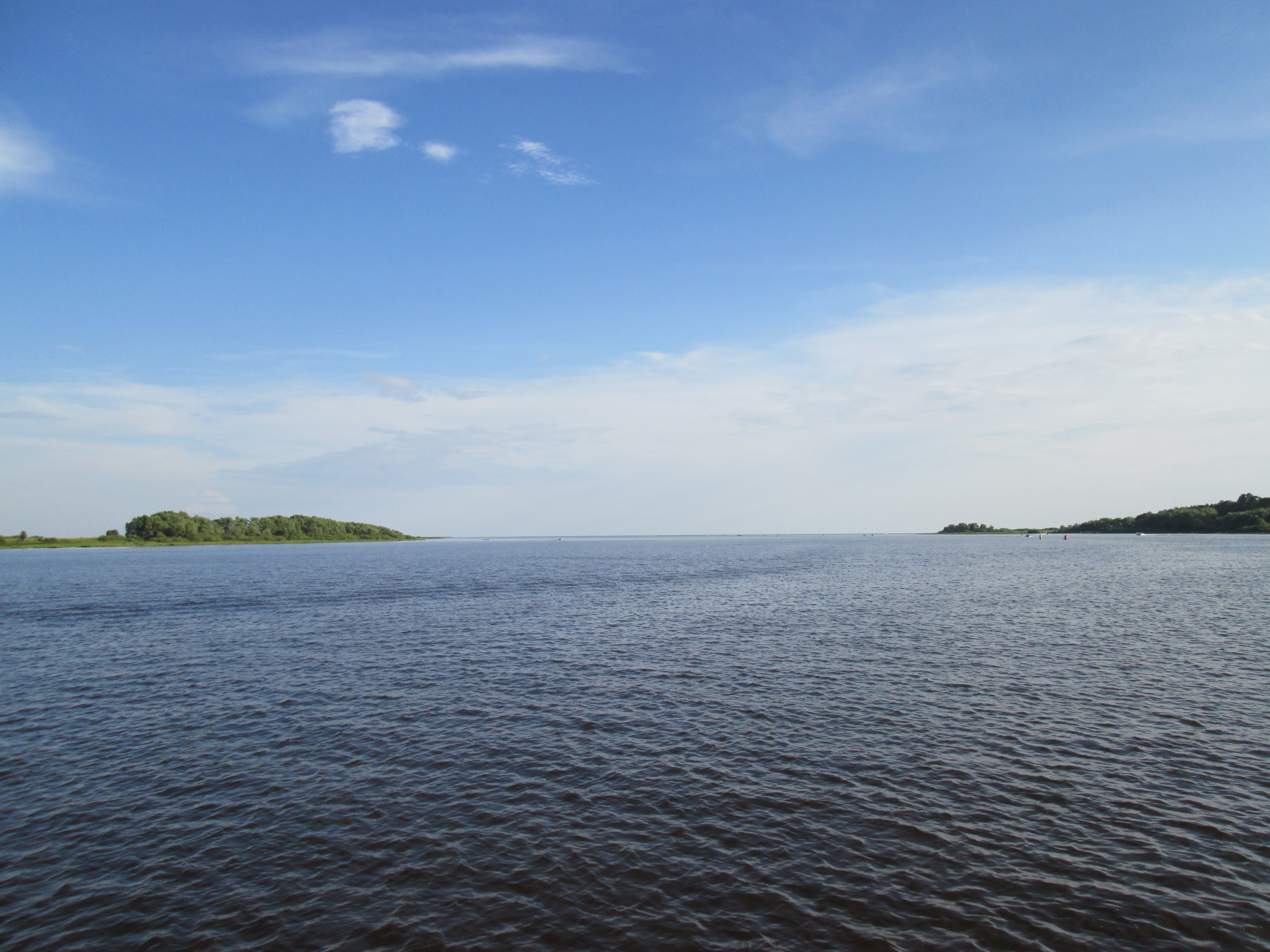 Исток Волхова из озера Ильмень. Вид со стороны реки.